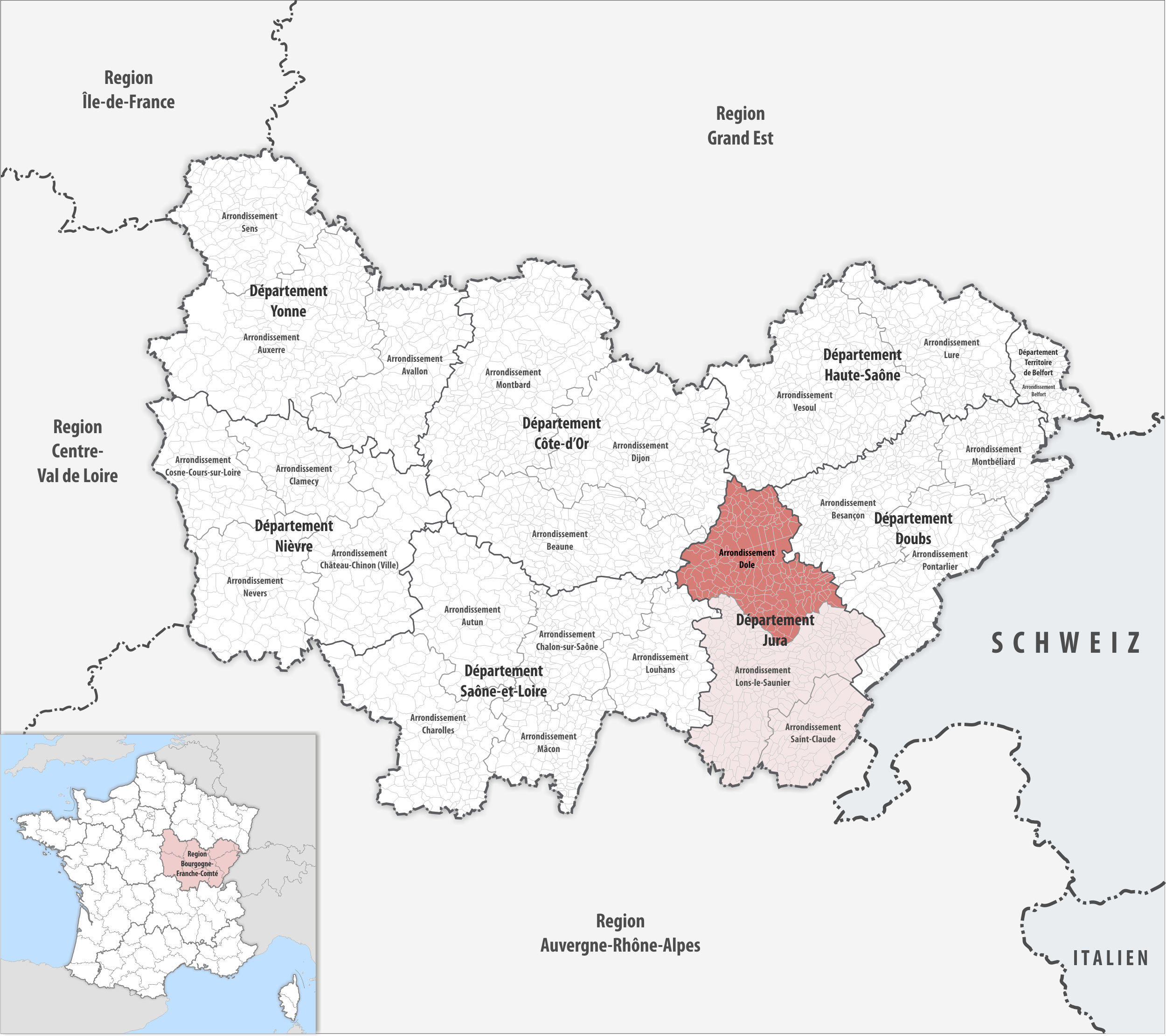 Lage des Arrondissements Dole